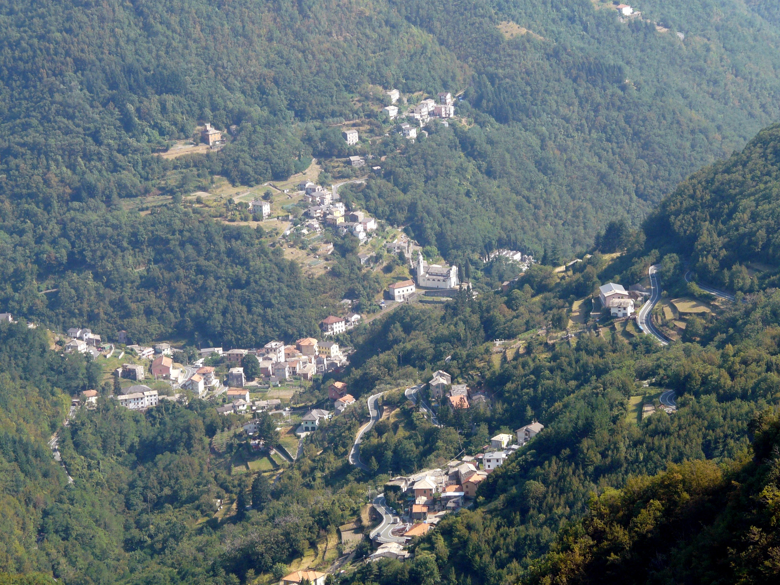 Panorama di Favale di Malvaro dal passo della Scoglina, Liguria, Italia